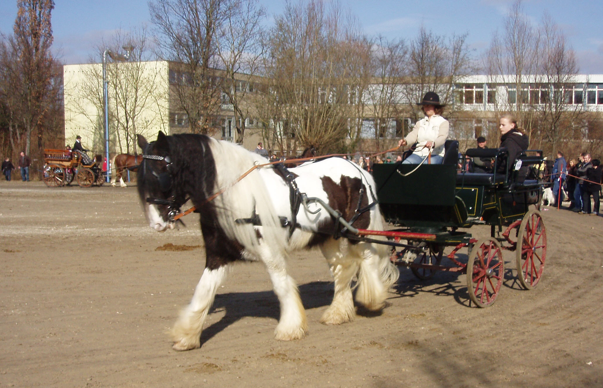 Tinker